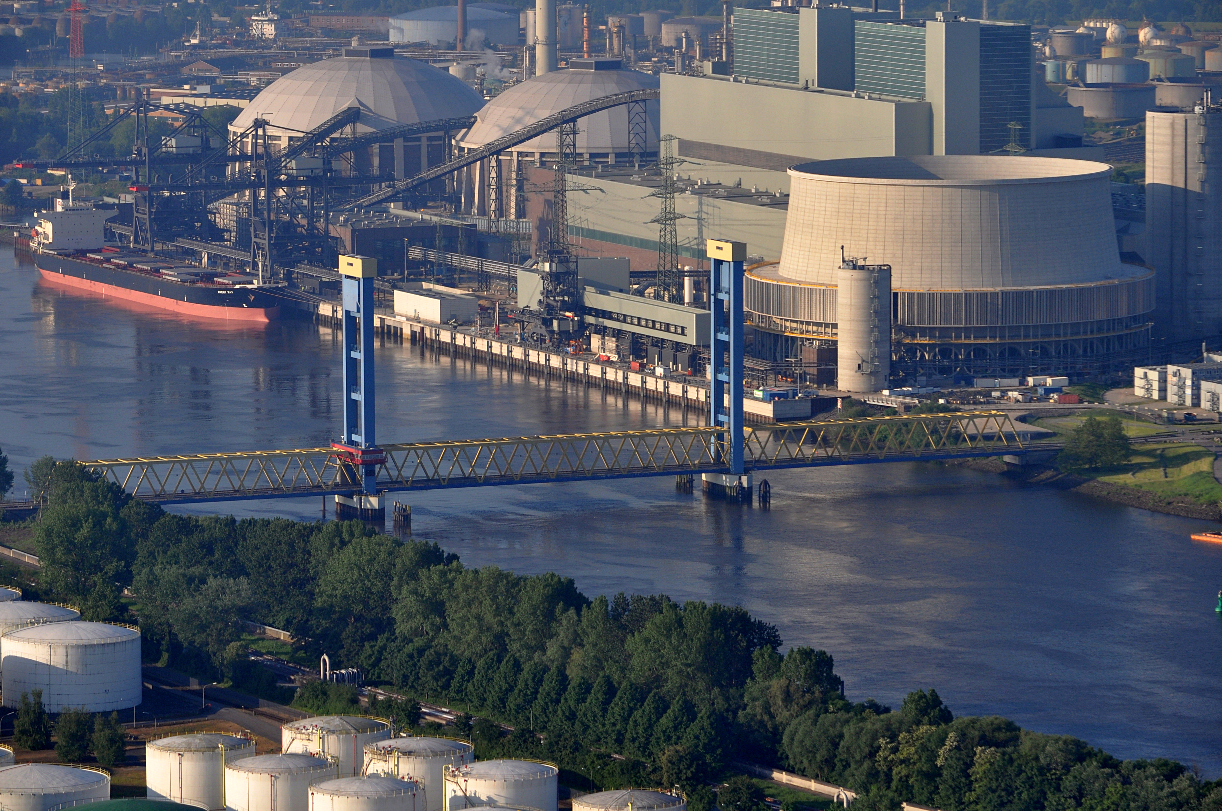 Kaianlage des Steinkohlekraftwerks Moorburg in Hamburg-Moorburg, im Vordergrund die Kattwykbrücke.